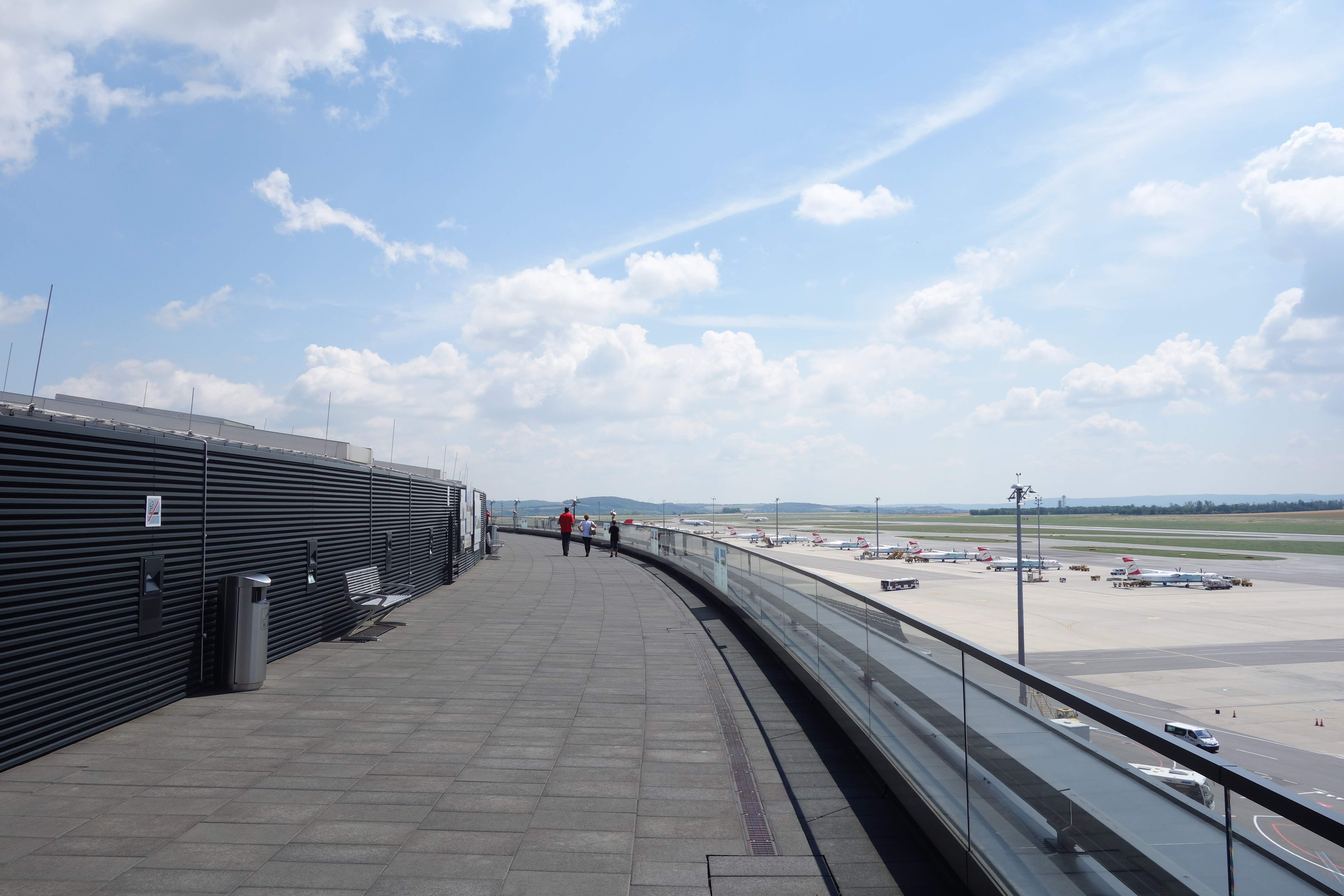 Die Besucherterrasse am Terminal 3 am Flughafen Wien im Juli 2014.